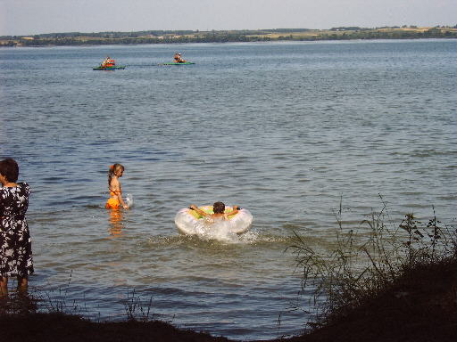 Blick vom russischen Ufer des Wystiter Sees nach Litauen.